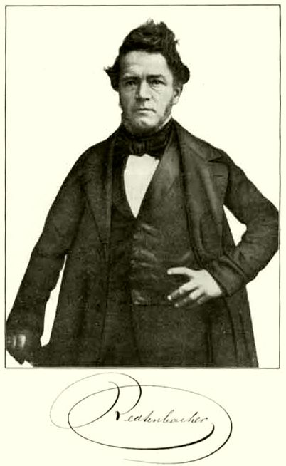 Porträt von Ferdinand Redtenbacher, 1809-1863, mit faksimiliertem Namenszug